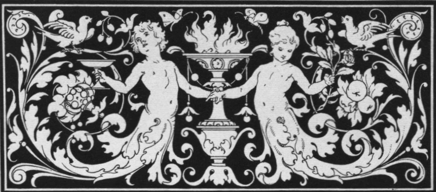 L. Cheyer: Leben und Tod (Allegorie), Buchillustration, 1882, Ausschnitt: Allegorie des Lebens. Auf einem prunkvollen, kunstvoll gedrechselten Kandelaber lodert in einer Schale ein züngelndes Feuer, das Symbol des Lebens. Um den Feuerständer schlängeln sich zwei fast gegengleiche Volutenranken. Sie entspringen wie der Schwanz eines Fischleibs aus dem Körper eines Knaben mit Trinkschale und eines Mädchens mit einem Rosenzweig, die wie zum Ringelreihen Händchen halten. Der Unterleiber der Kinder münden in eine reich gezackte Akanthusranke, das sich spiralig zu einer Volute ringelt und am Ende eine Prachtblüte bzw. zwei Äpfel trägt, beides Symbole des Wachstums und damit des Lebens. Die Ranke verzweigt sich mehrmals und läuft zu den Ecken des Bildes nochmals in Voluten aus. Auf den oberen Rankenbögen zwitschern fröhlich zwei Tauben. Sie sind nicht nur Symbole des Friedens, sondern auch der Liebe und der Fortpflanzung, die das Leben im Gang hält. Zwei Schmetterlinge, Sinnbilder von Auferstehung und Unsterblichkeit, flattern in gefährlicher Nähe um das Feuer und symbolisieren so auch die Gefahren des Lebens.